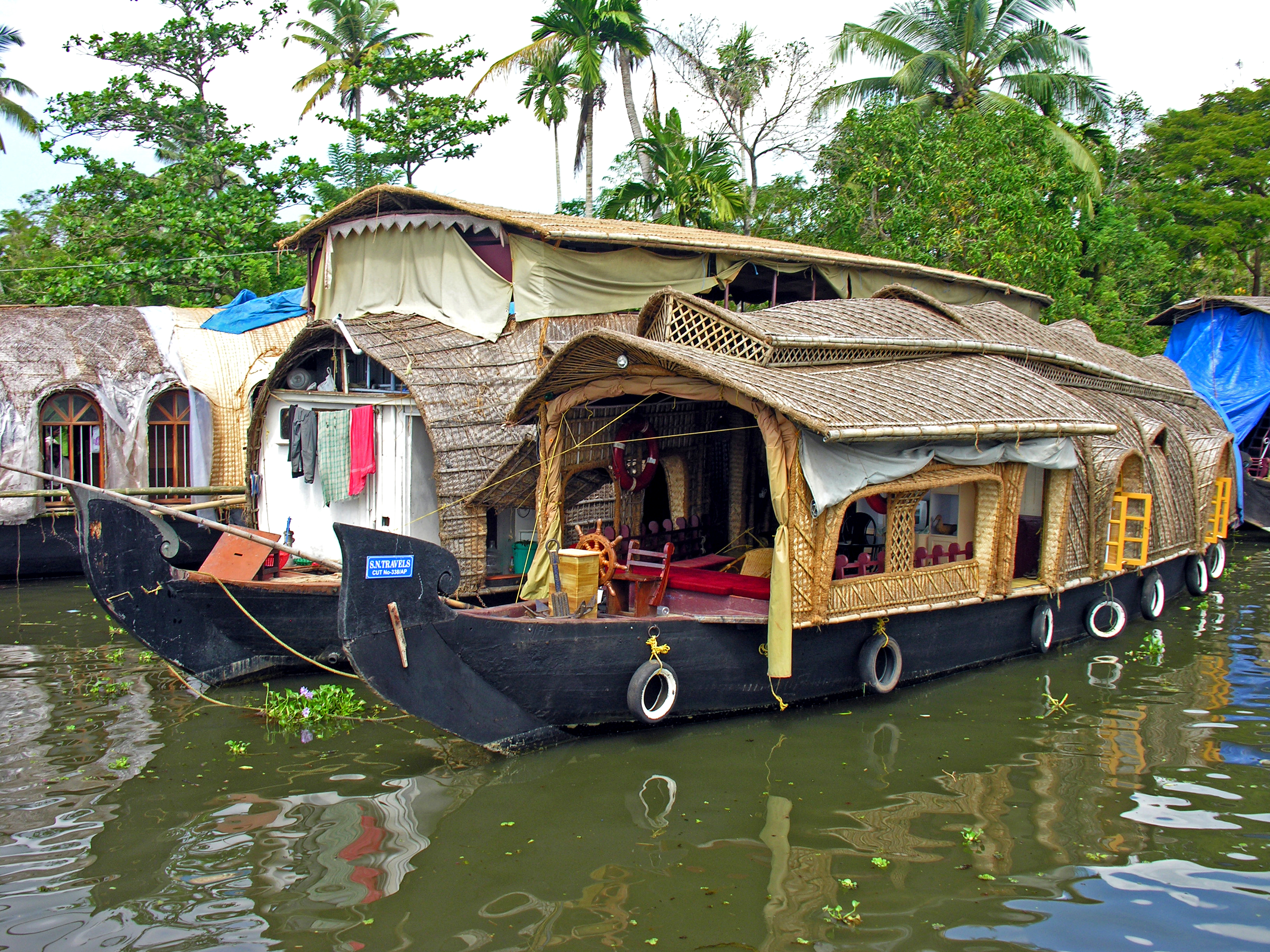 India-7688